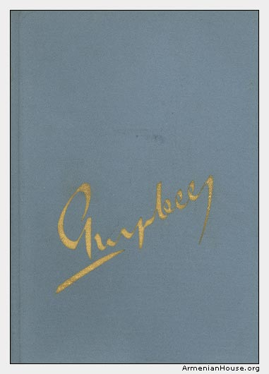 Եղիշե Չարենցի "Երկիր Նաիրի" վեպի կազմի երեսը։